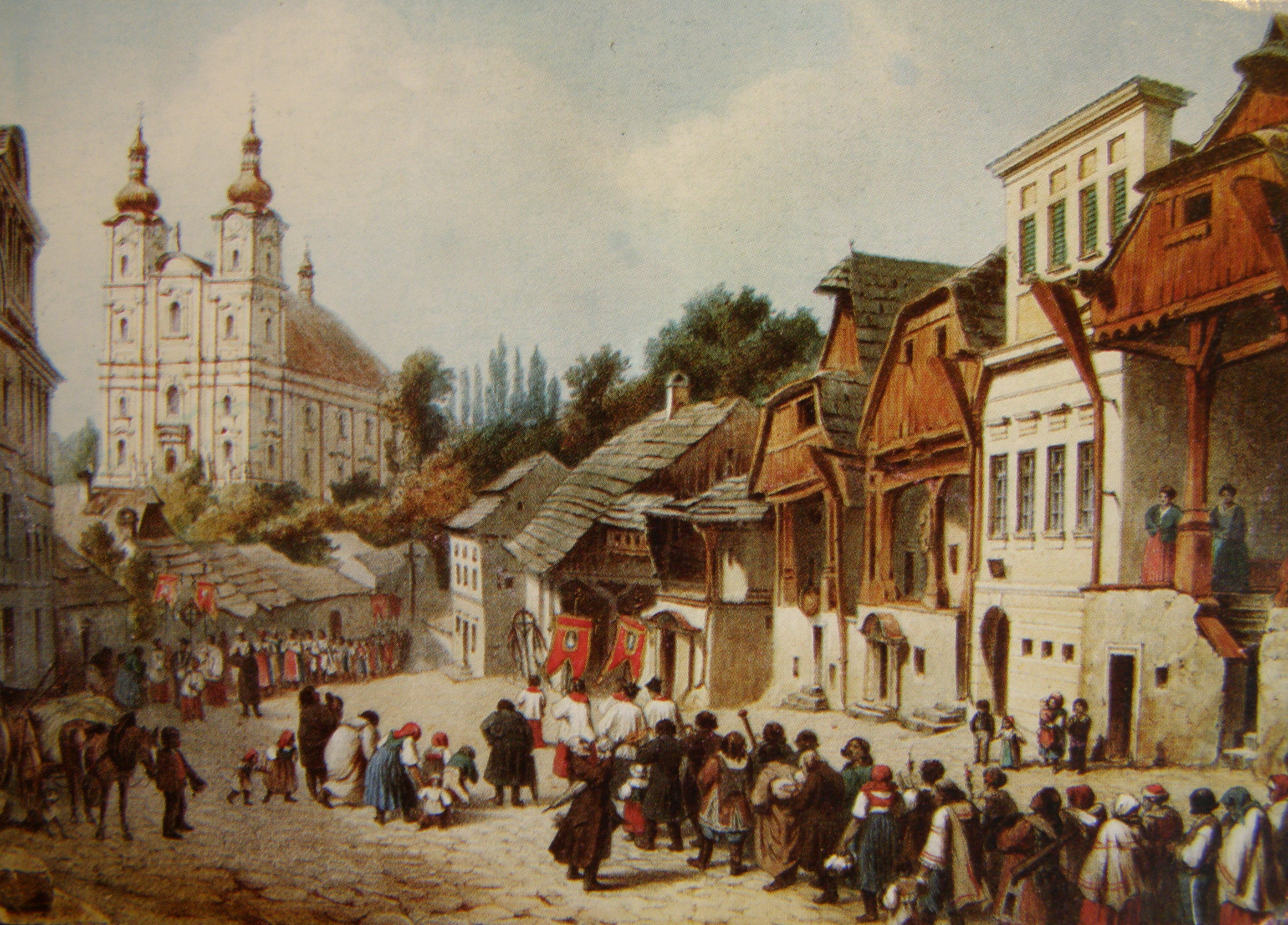 Frýdek-Místek: kostel Navštívení Panny Marie (dnes basilika minor )